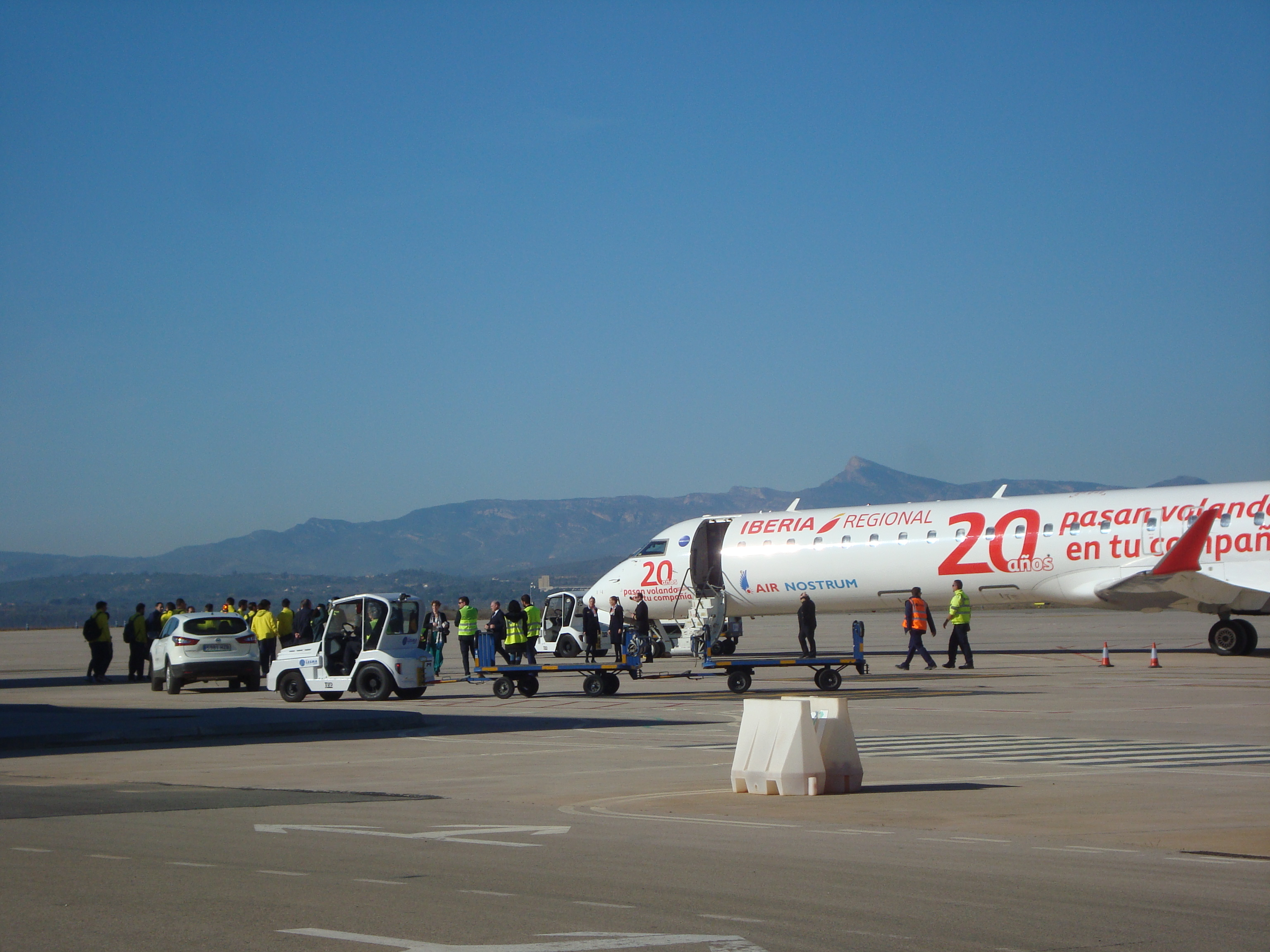 Aeropuerto de Castellón-Costa Azahar